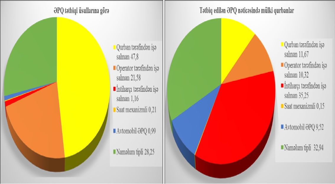 ƏPQ -Qurban nisbəti